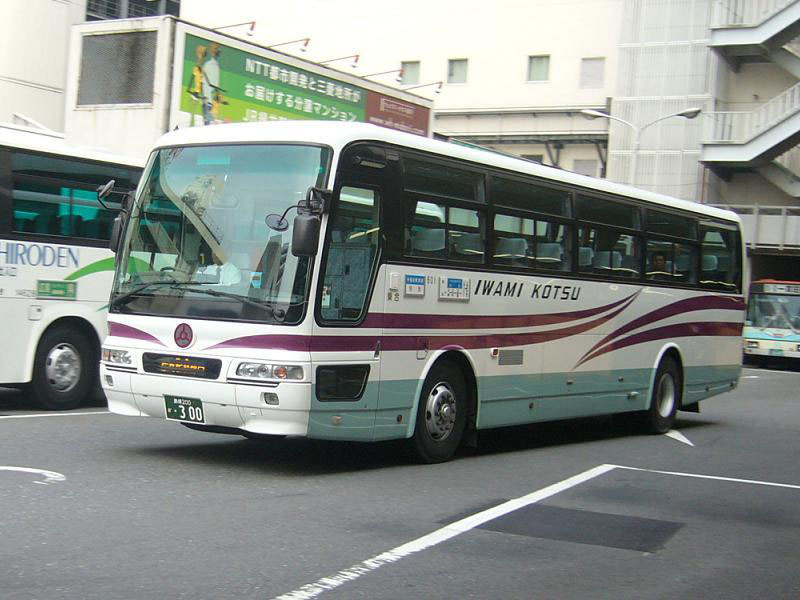 登録番号 島根200か・300 石見交通バス所属 広益線用 2006年12月16日 広島バスセンターにて撮影 撮影者 Tokatsu kokubu